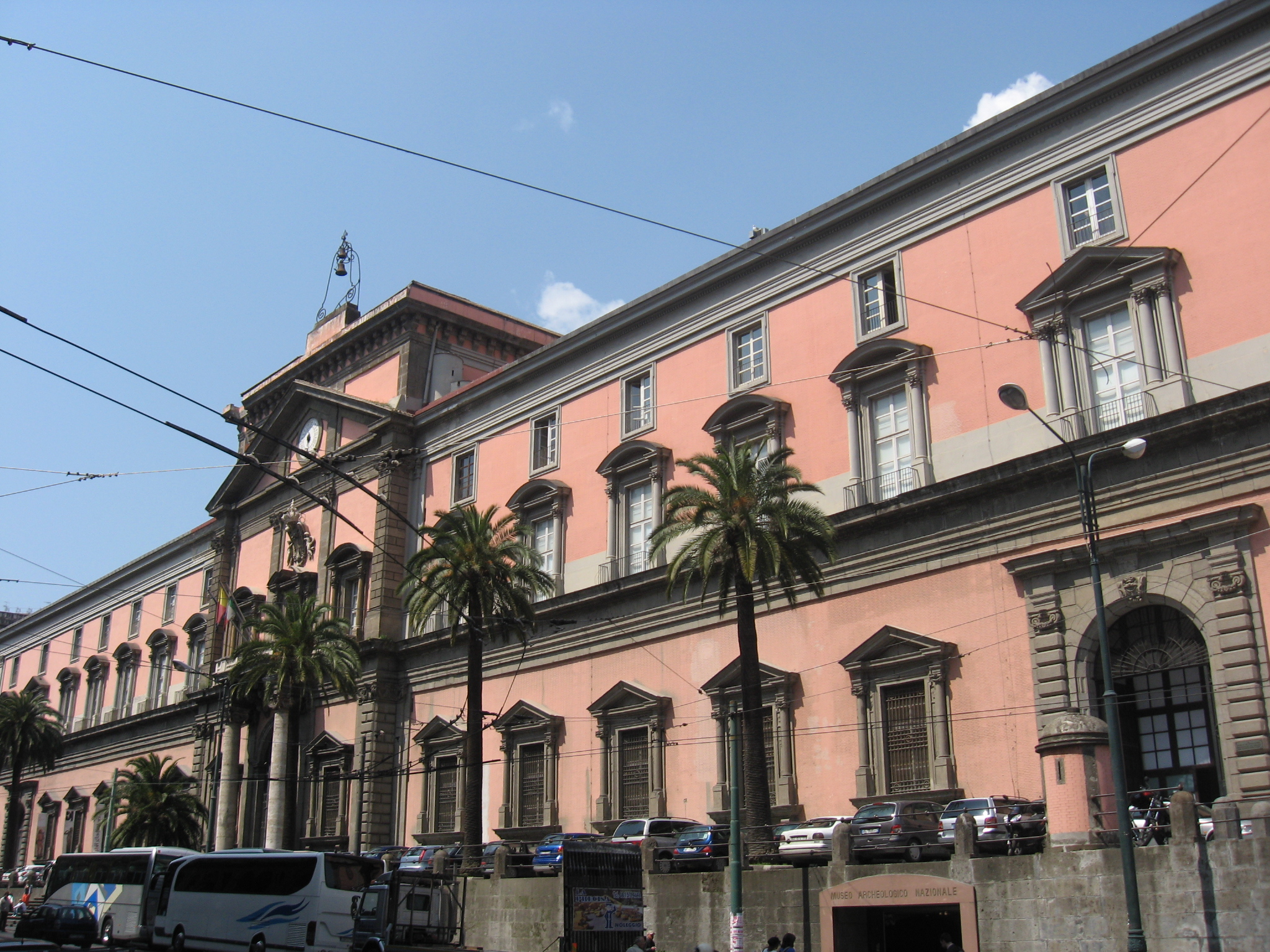 Nápolyi Régészeti Múzeum